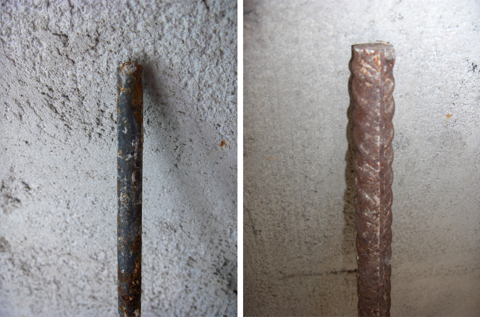 Barre d'acciaio per armatura di strutture in cemento armato, a destra il tipo attualmente in uso ad aderenza migliorata